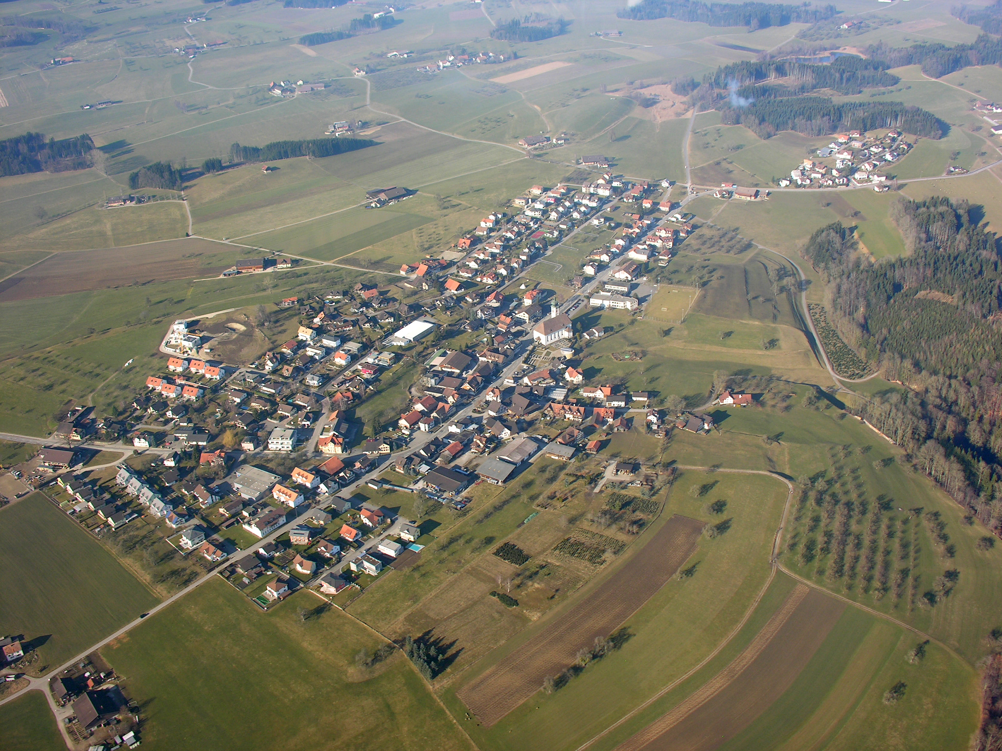 Aerial View of Niederhelfenschwil